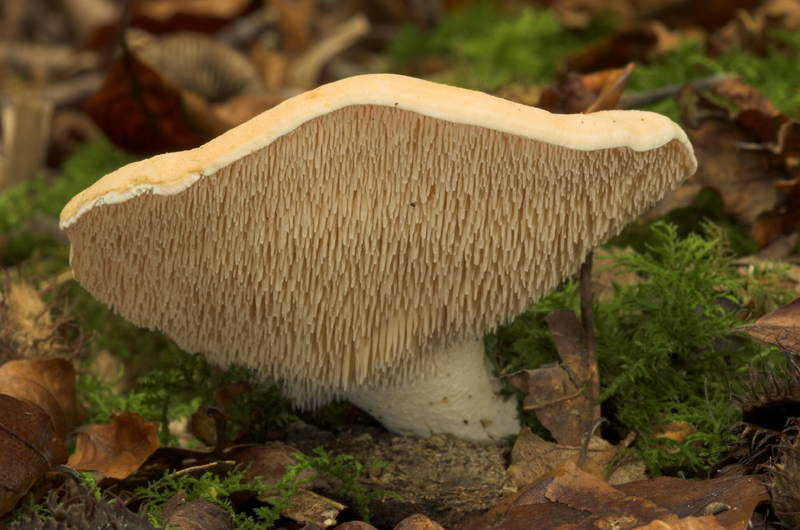 Hydnum repandum, Hedgehog Fungus